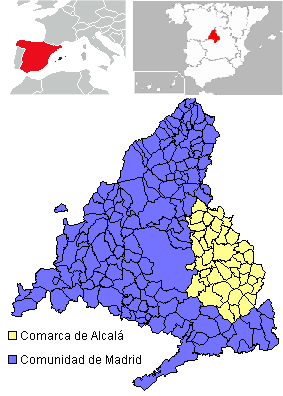 Localidades de la Comarca de Alcalá.